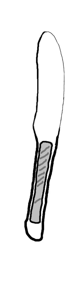 銅刀，烏孫文物。